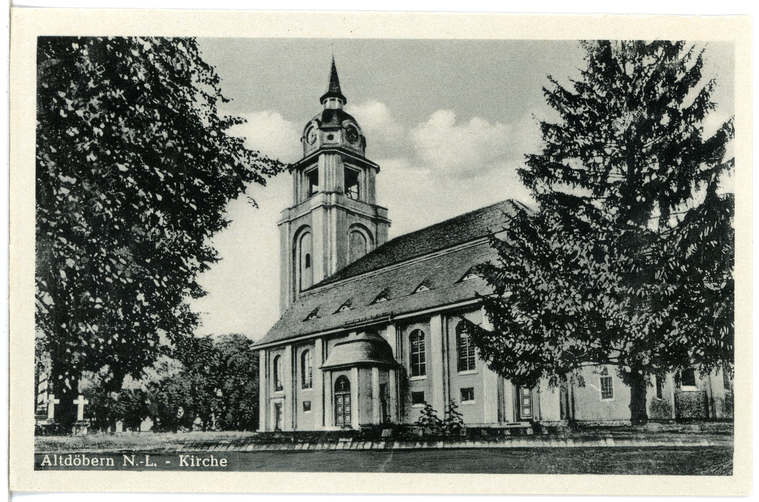 Altdöbern; Kirche This postcard is from publisher Brück & Sohn in Meißen ( postcard has a unique number 28317 and is available in a higher resolution at the publisher. This images was uploaded in a cooperation project between Wikipedians and the publisher.